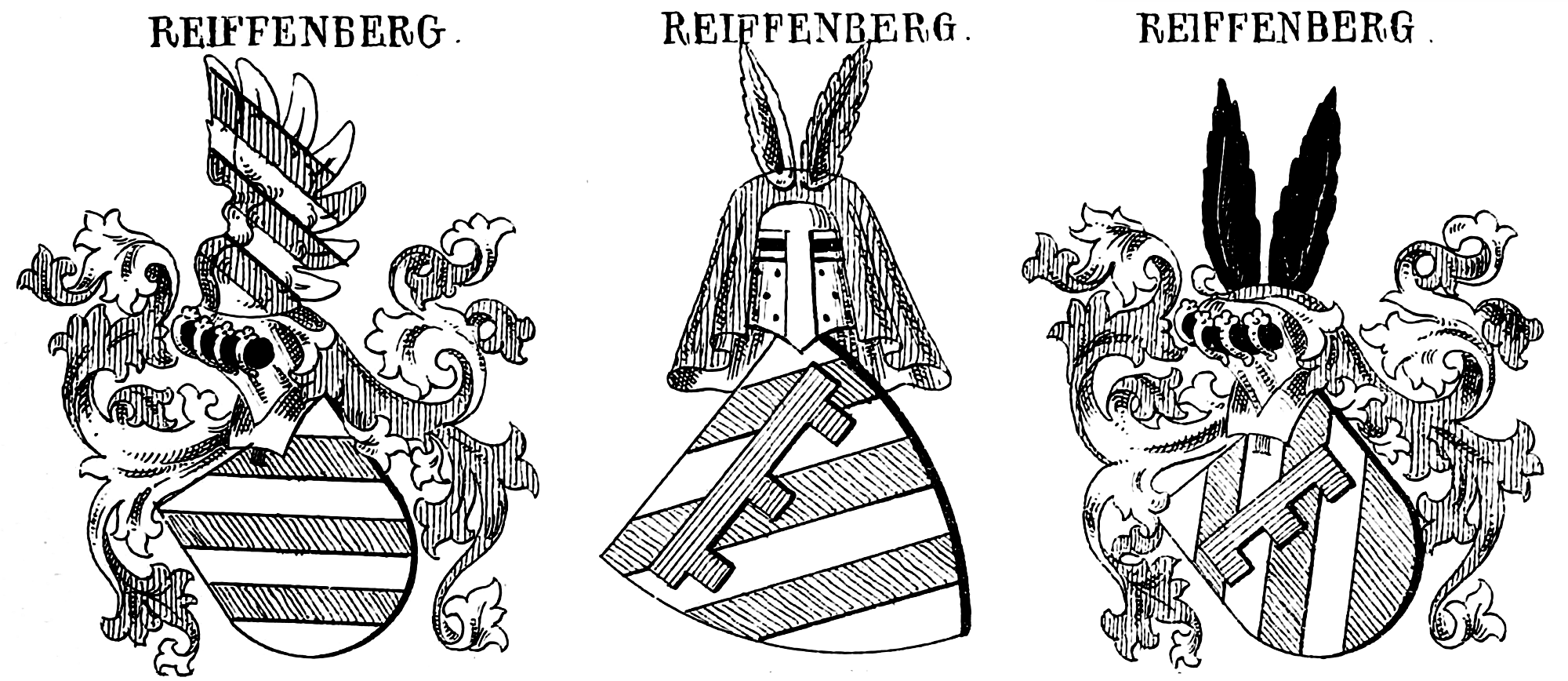 Drei Wappen der von Reiffenberg